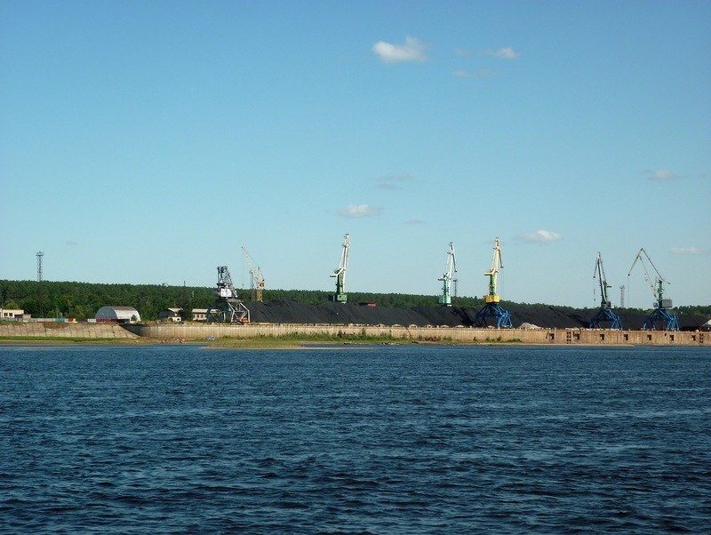 Порт Камбарский